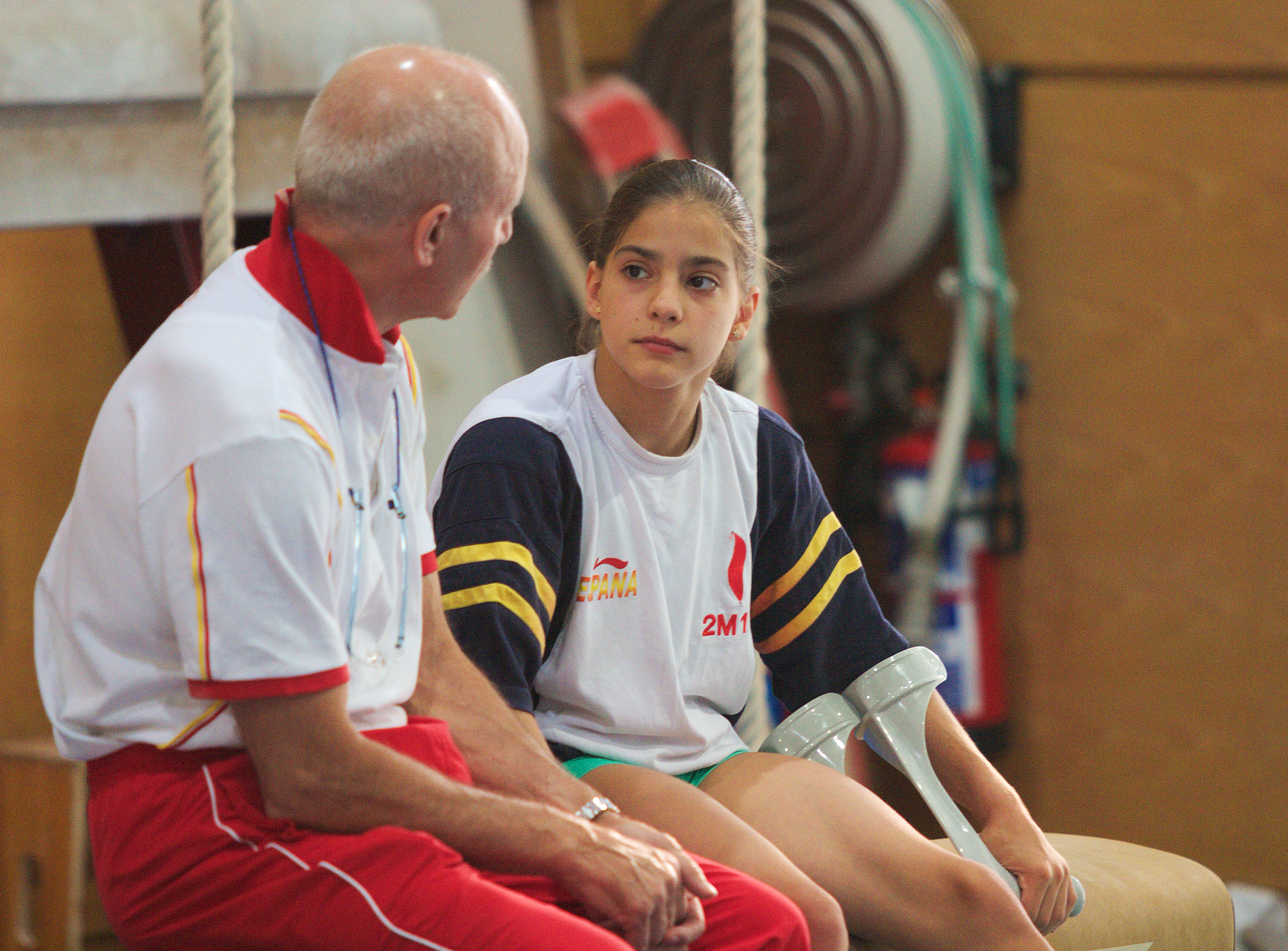 Laura Campos y Fillo Carballo en el CAR de Madrid el 15 de septiembre de 2004.